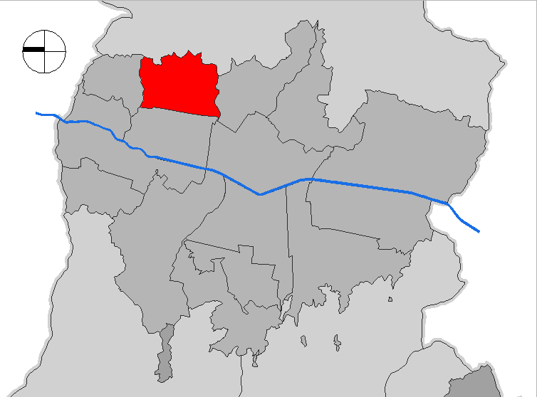 mapa de la comuna Manrique. Medellín, Colombia.